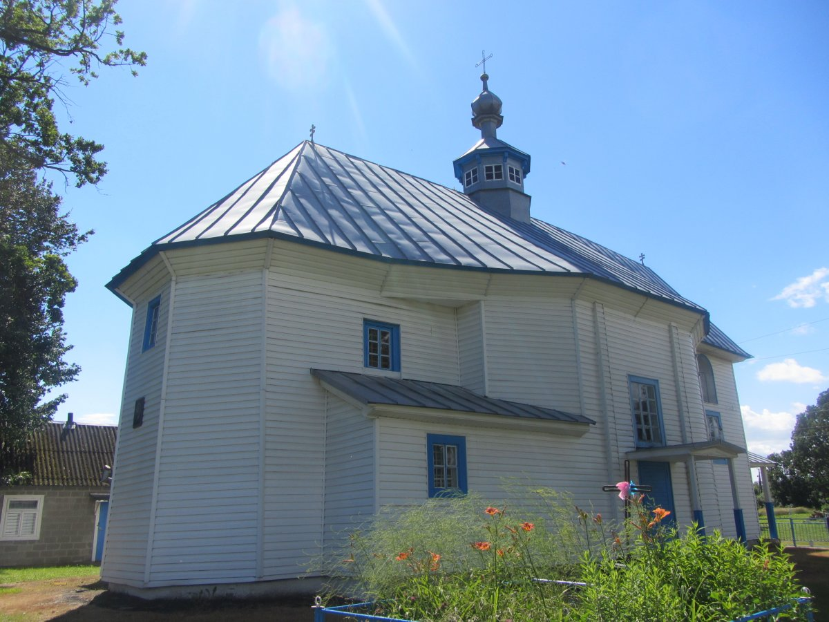 Ляхавічы. Спаса-Узнясенская царква